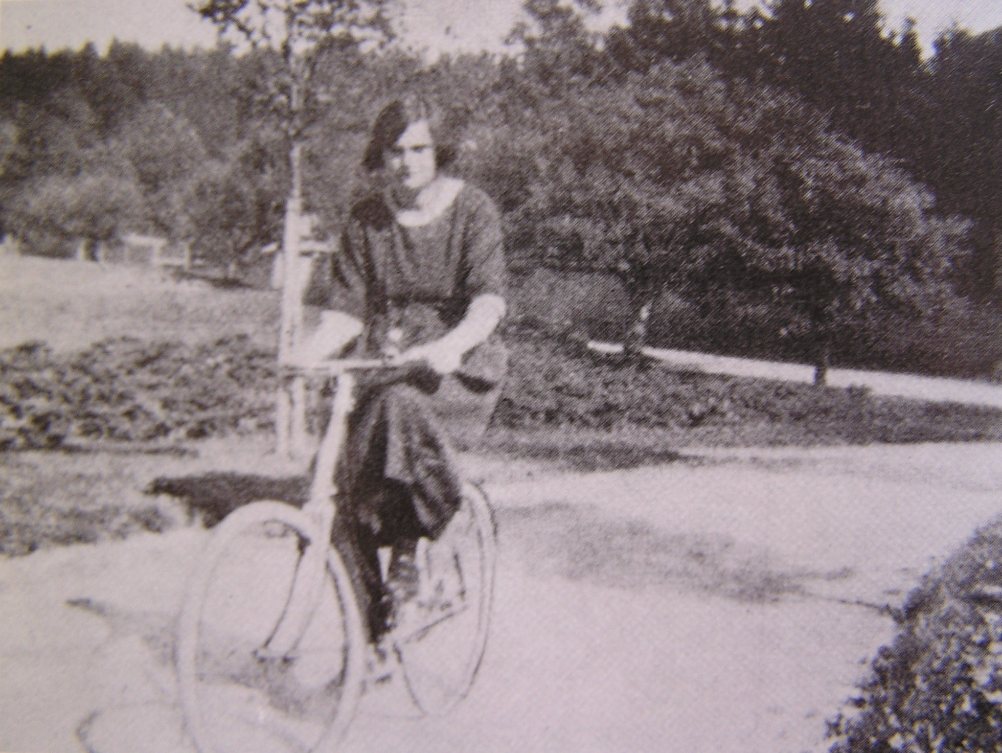 Adrienne von Speyr durante il suo giro della Svizzera in bicicletta.